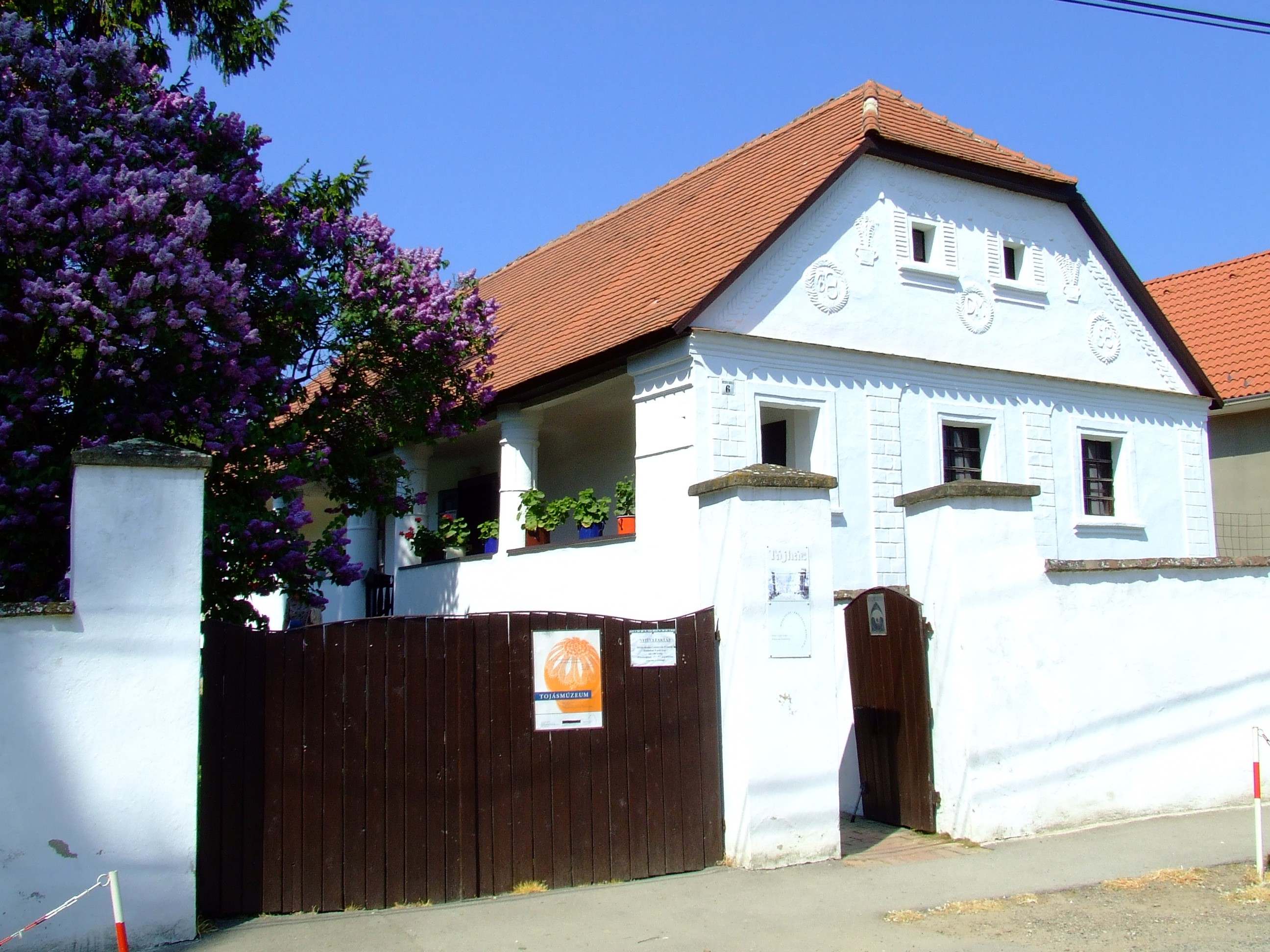 A zengővárkonyi tájház épülete